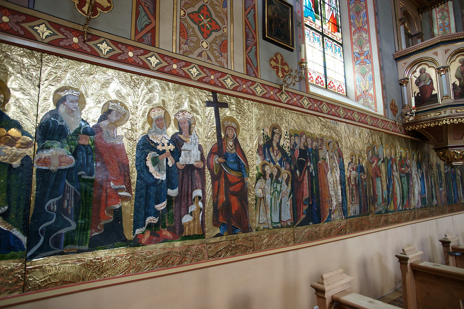 Kath. Pfarrkirche hl. Martin. Heiligenrelief